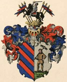 Buhrmeisteri suguvõsa aadlivapp